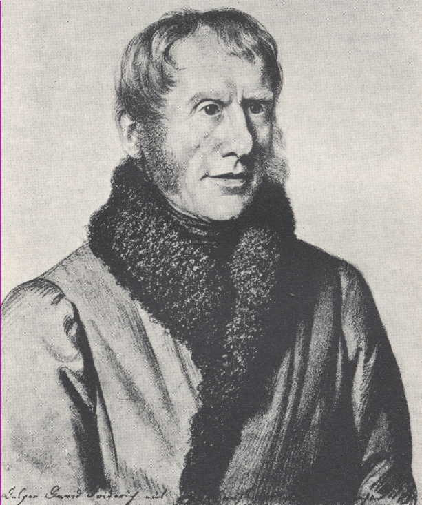 Bildnis des Malers Caspar David Friedrich von Carl Vogel von Vogelstein